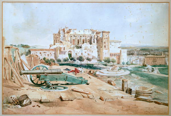 Assedio di Roma, 1849 Repubblica Romana (XVIII-XIX secolo) - Roman Republic (19th century) - République romaine (1849) - Römische Republik (1849)